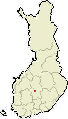 Own work